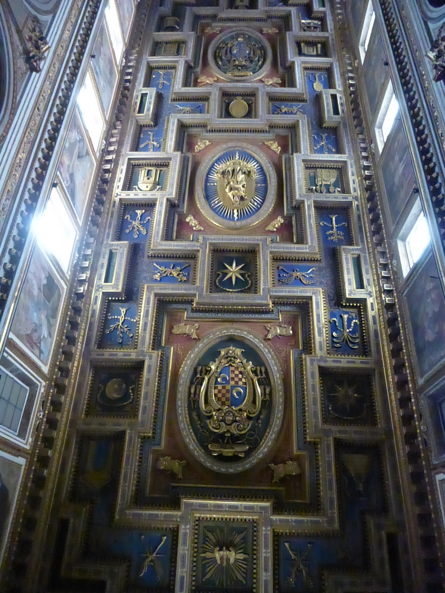 Roma, S. Marcello al Corso, soffitto.